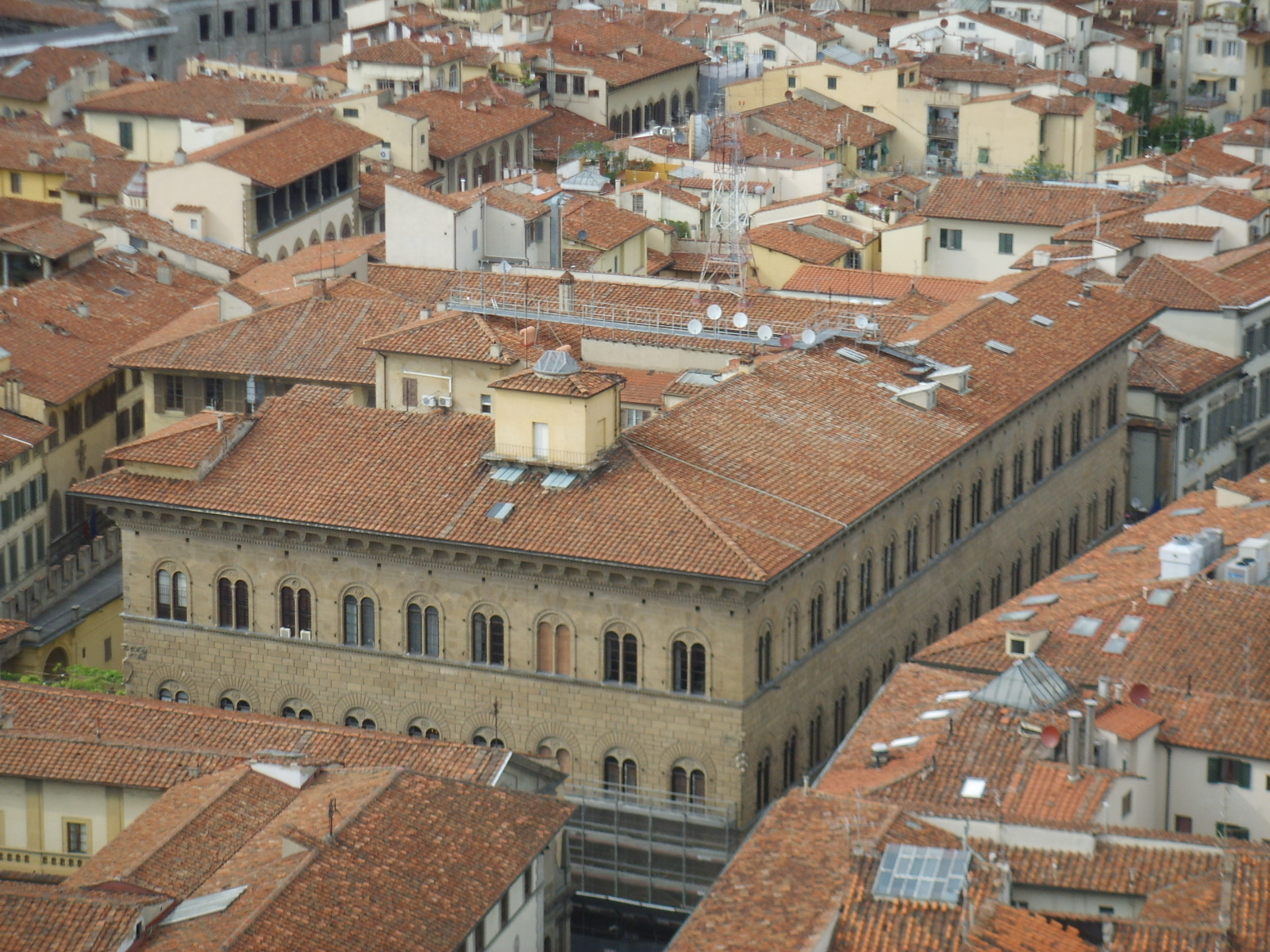 Palazzo medici riccardi view11